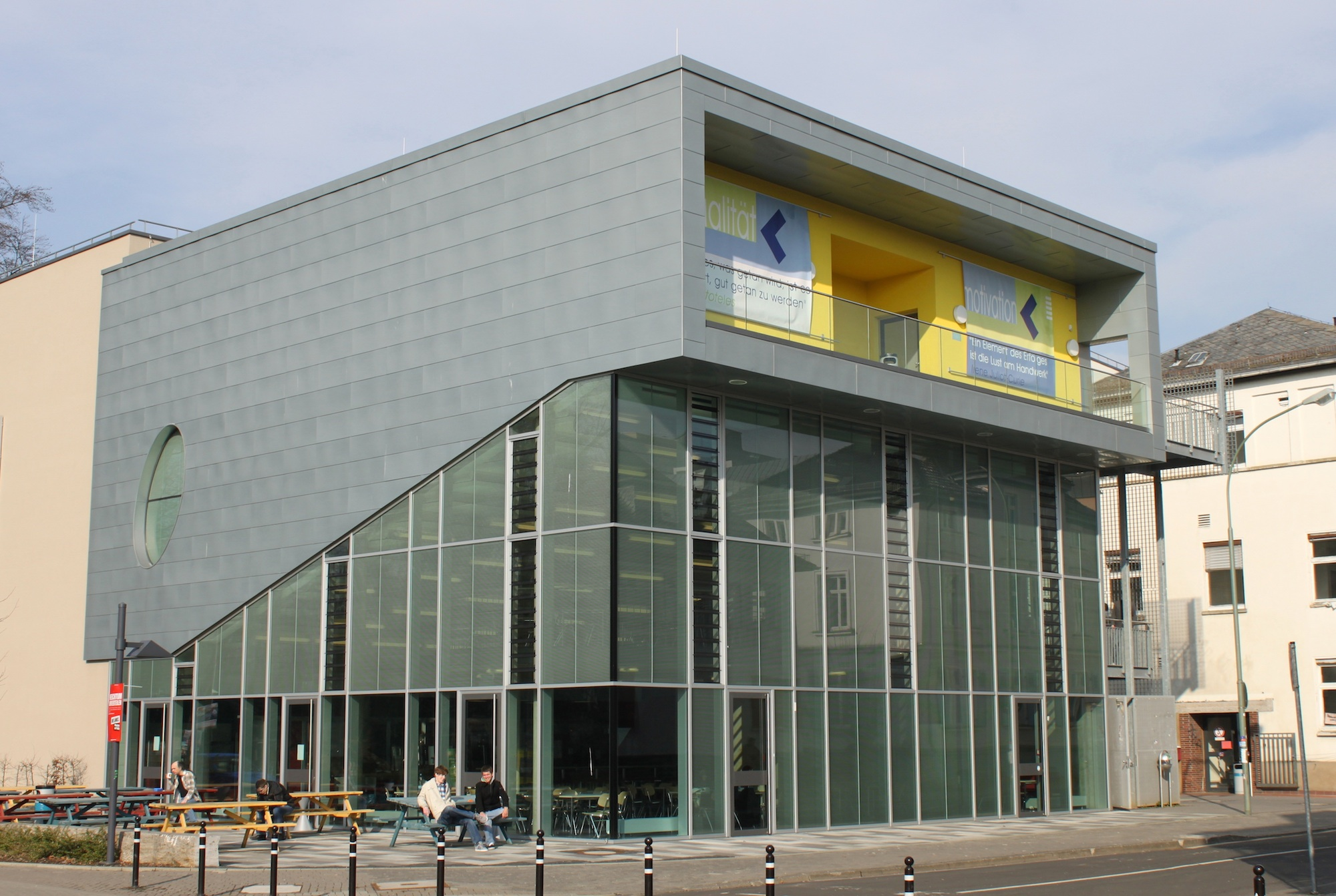 Mensa 'Campus-Tor' und Haus I der Technischen Hochschule Mittelhessen (THM)